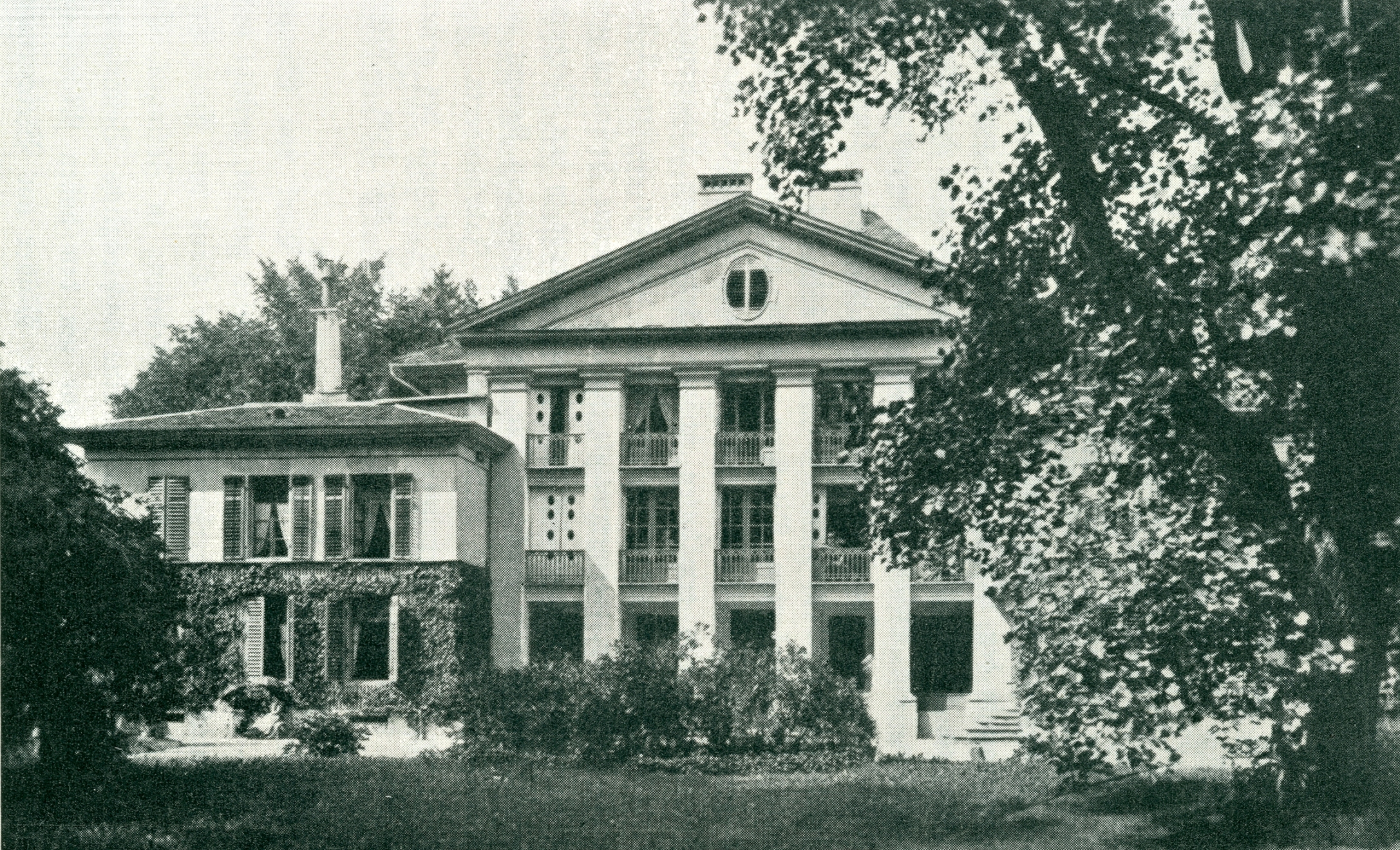 Meyerhaus in Aarau, vor 1939. Foto Hergert, Aarau, in: Aarauer Neujahrsblätter, 1939, S. 53.